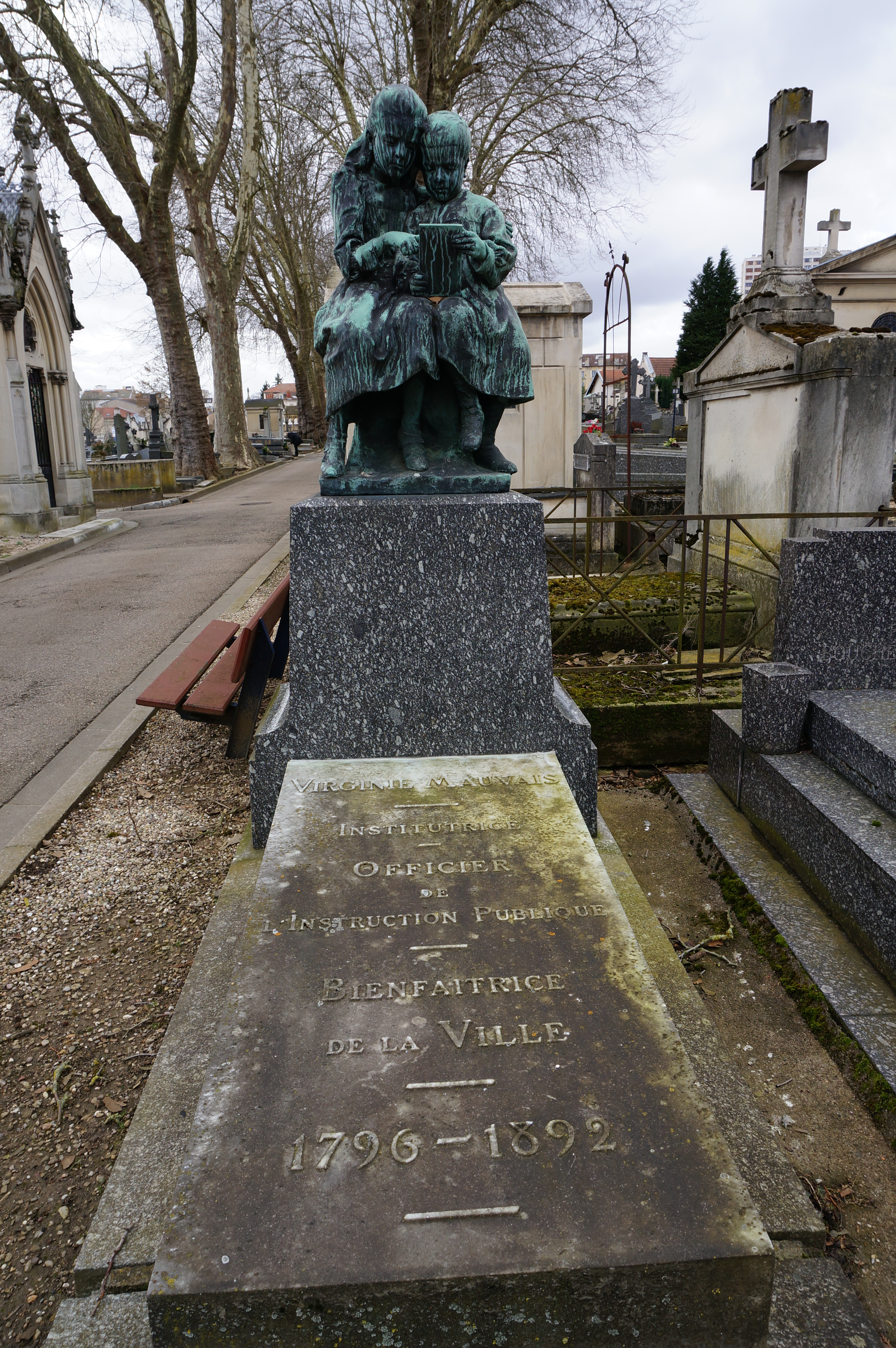 Au Cimetière de Préville, statuaire de Bussière.